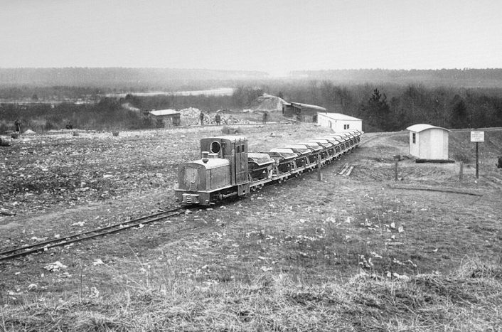 Müllberg zu Entstehungsbeginn mit Feldbahn. Hannovers Müllberg Monte Müllo entsteht im Moor, Zustand 1937 mit Feldbahn.